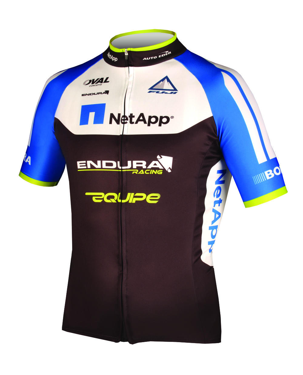 Trikot NetApp - Endura 2013